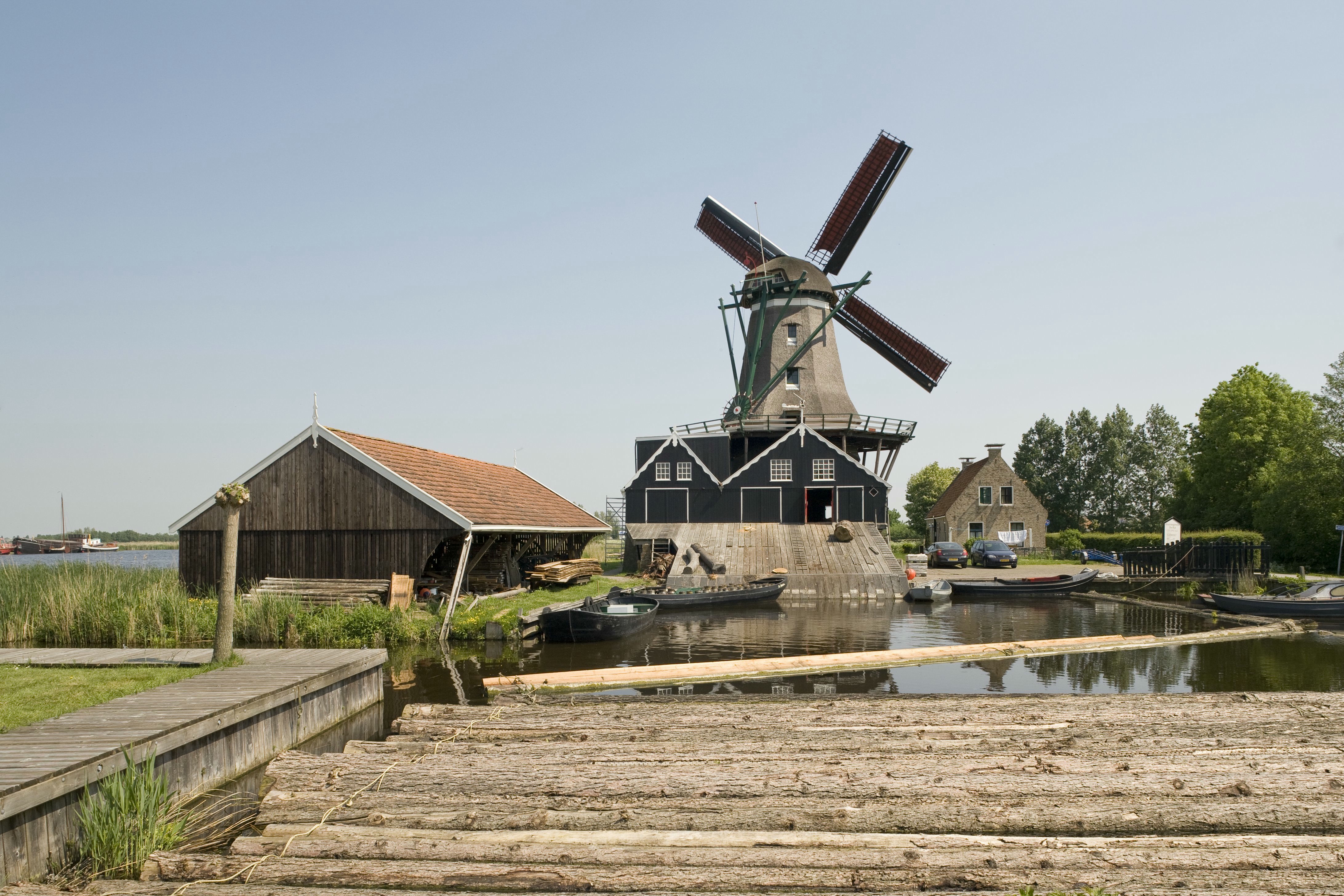 De Rat: Overzicht van de molen (opmerking: Project RRWR)